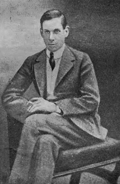 Jack Russell, 25th Baron de Clifford (-1906)